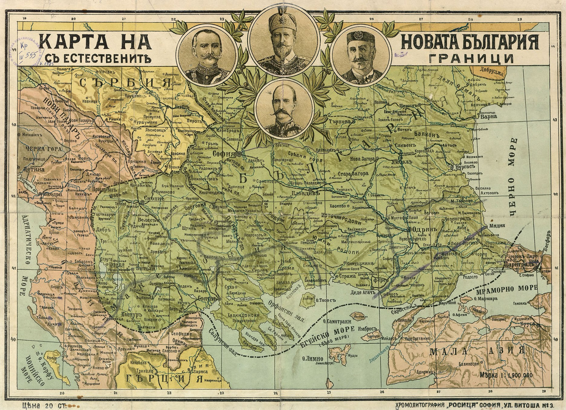 Карта на Велика България от 1913 година.